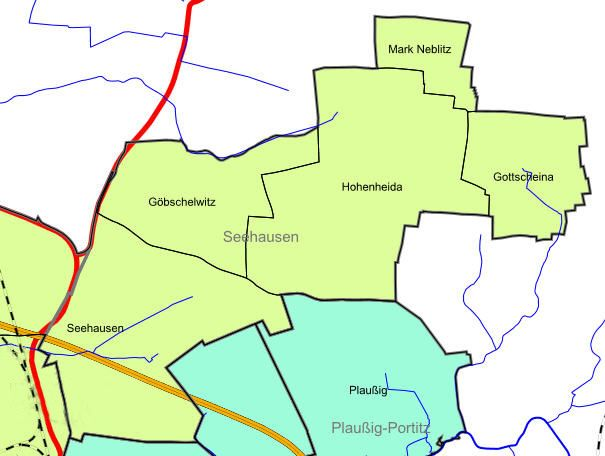 Fluren des Leipziger Ortsteils Seehausen, Stand 2005